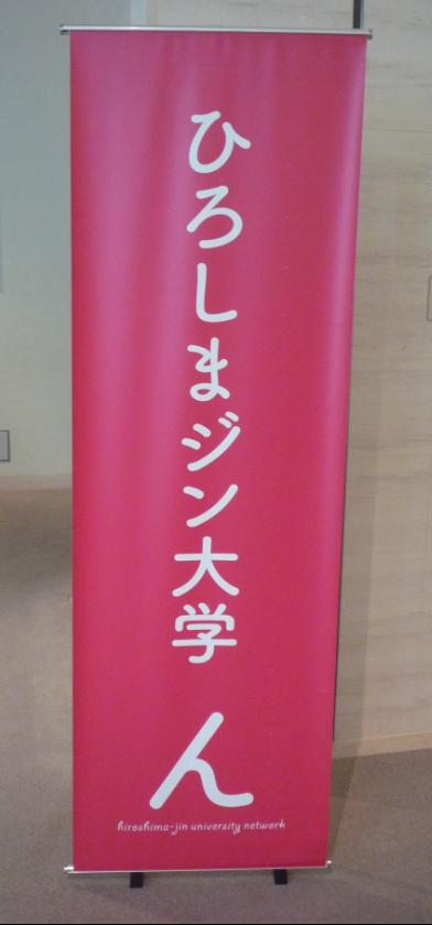 ひろしまジン大学のバナー